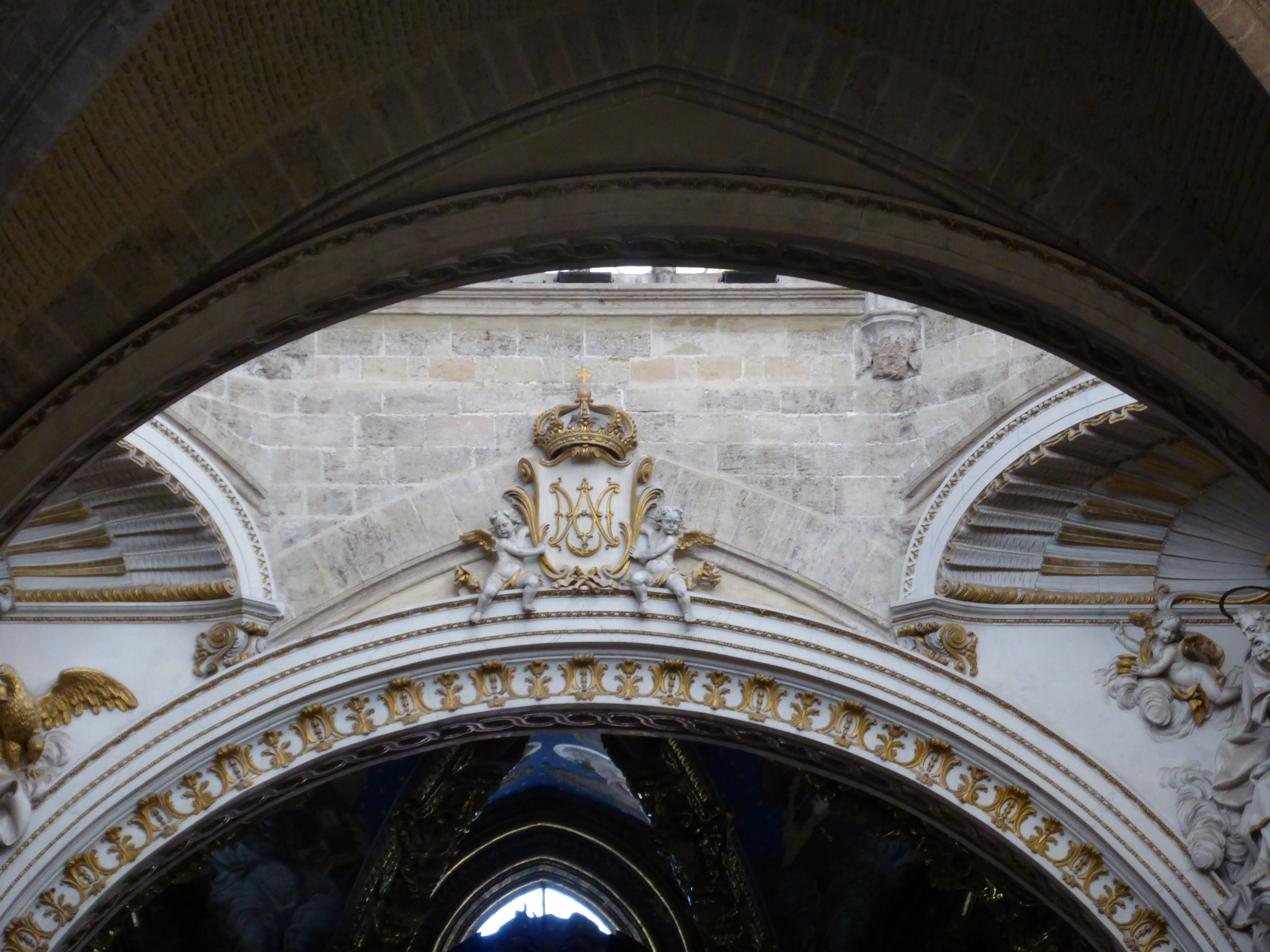 Vista del interior de la catedral de Valencia. Los arcos góticos del crucero fueron enmascarados con arcos clásicos. También se decoraron las pechinas del cimborrio, con estucos.